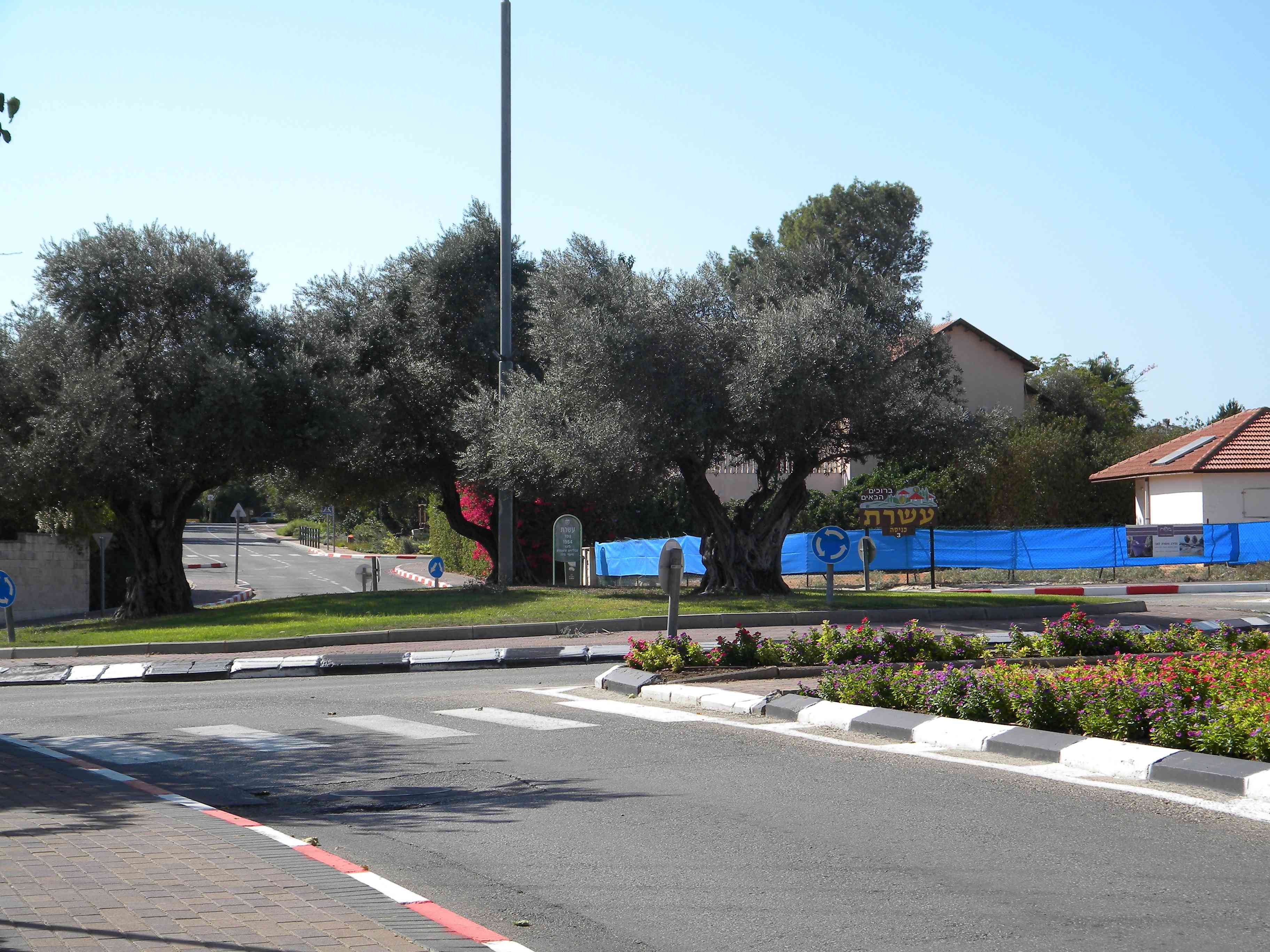 הכניסה הצפונית לעשרת